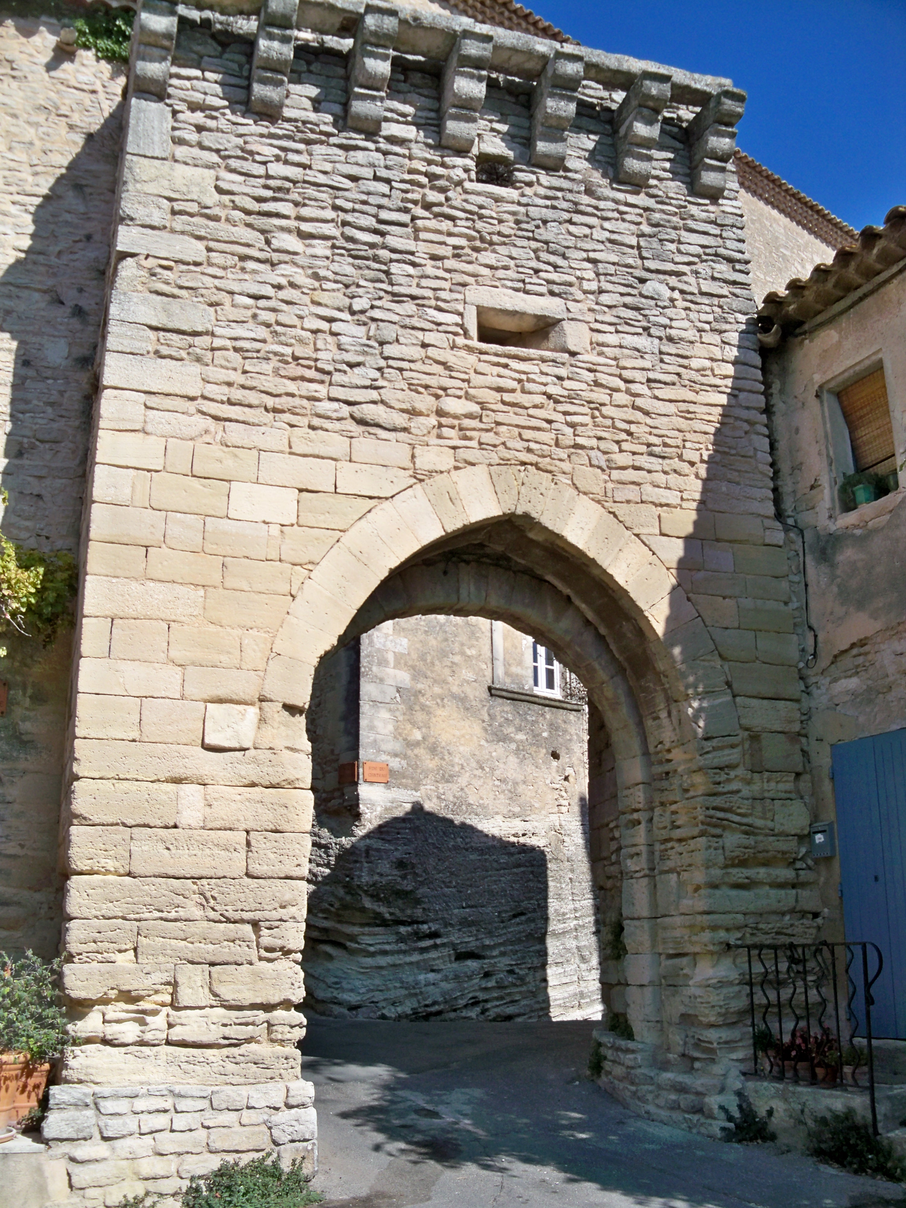 Ancienne porte d'entrée de la ville à Goult (84)